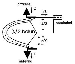 Dipool antenne aanpassing d.m.v halve golflengte balun. Zelf gemaakte computerschets